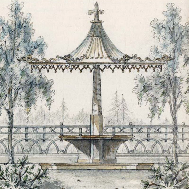 Parasol projekterad för Ängelske parken vid Wällinge.